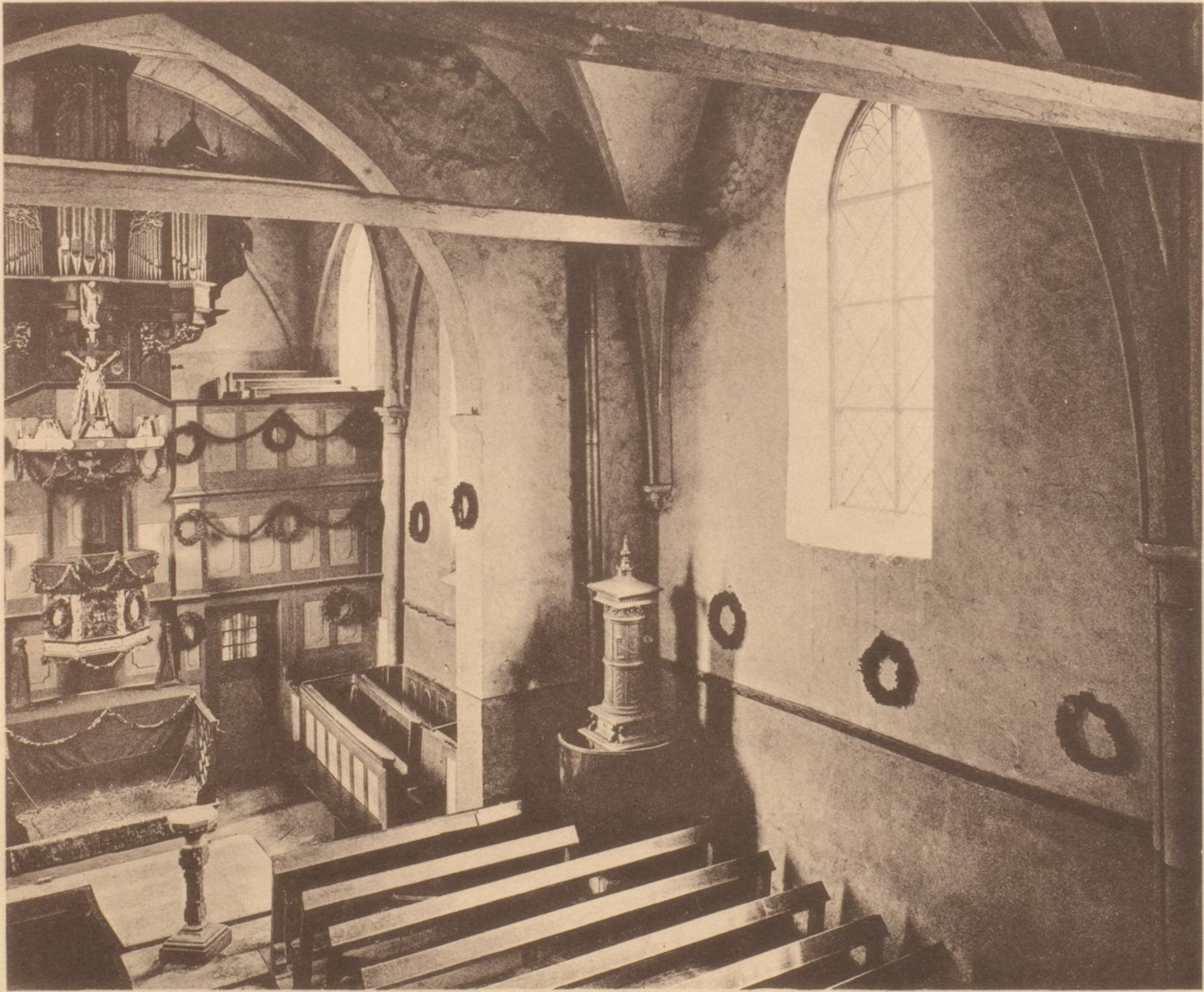 Die Innenansicht der Lutherkirche in Dortmund Asseln vor dem Umbau im Jahre 1890